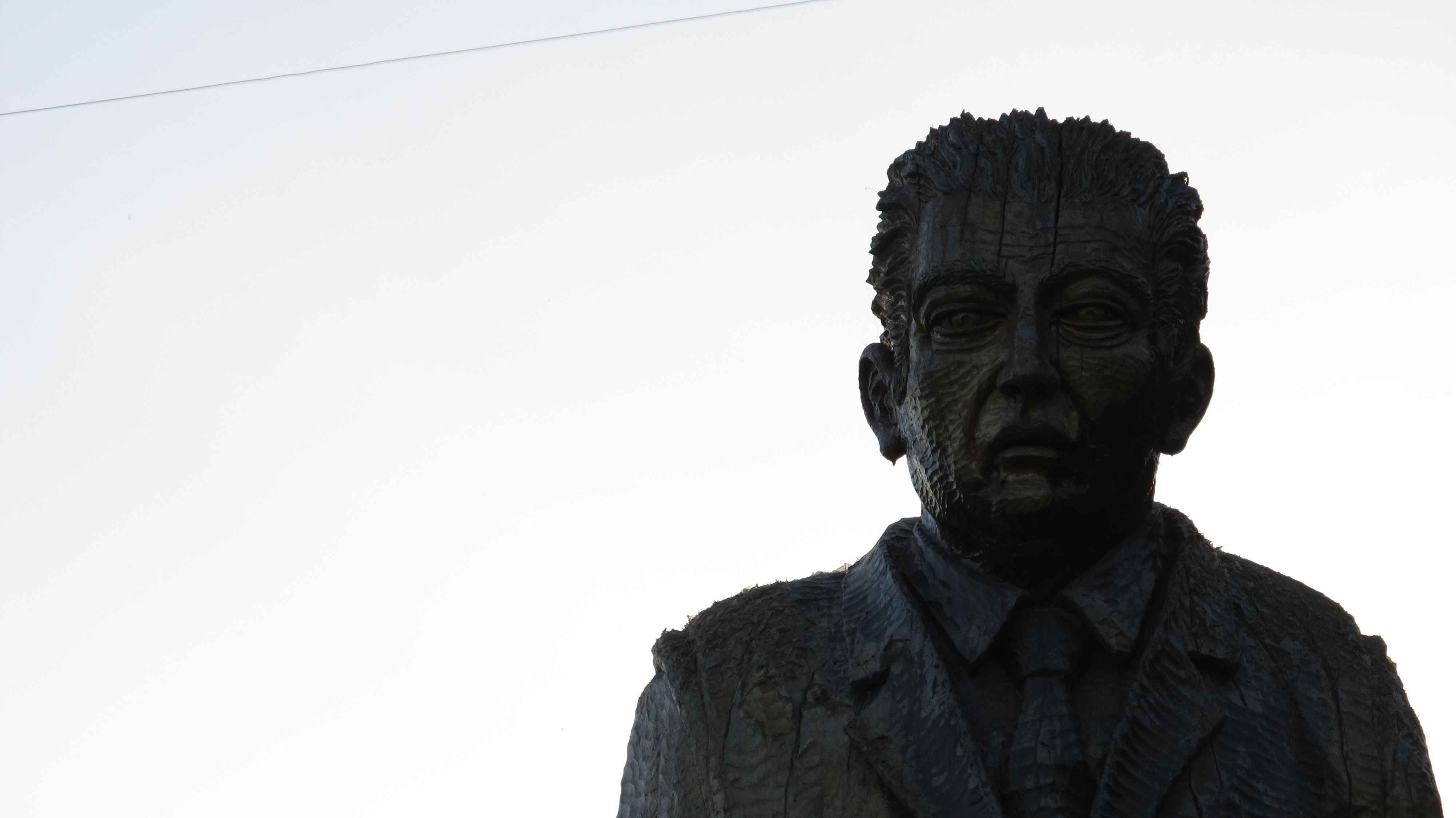 Estatua de Pablo de Rokha en Licantén, Chile